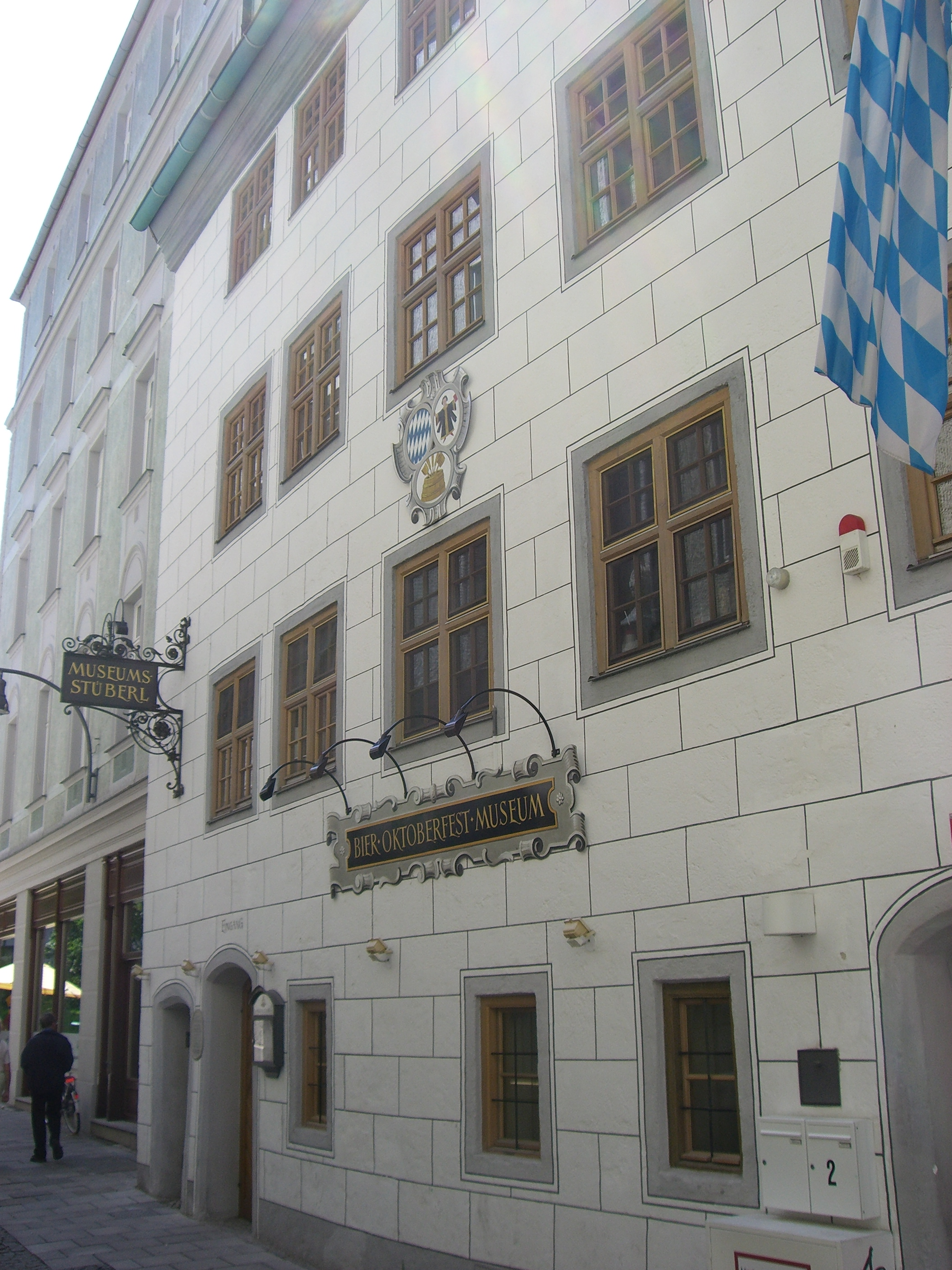 München - Bier- und Oktoberfestmuseum